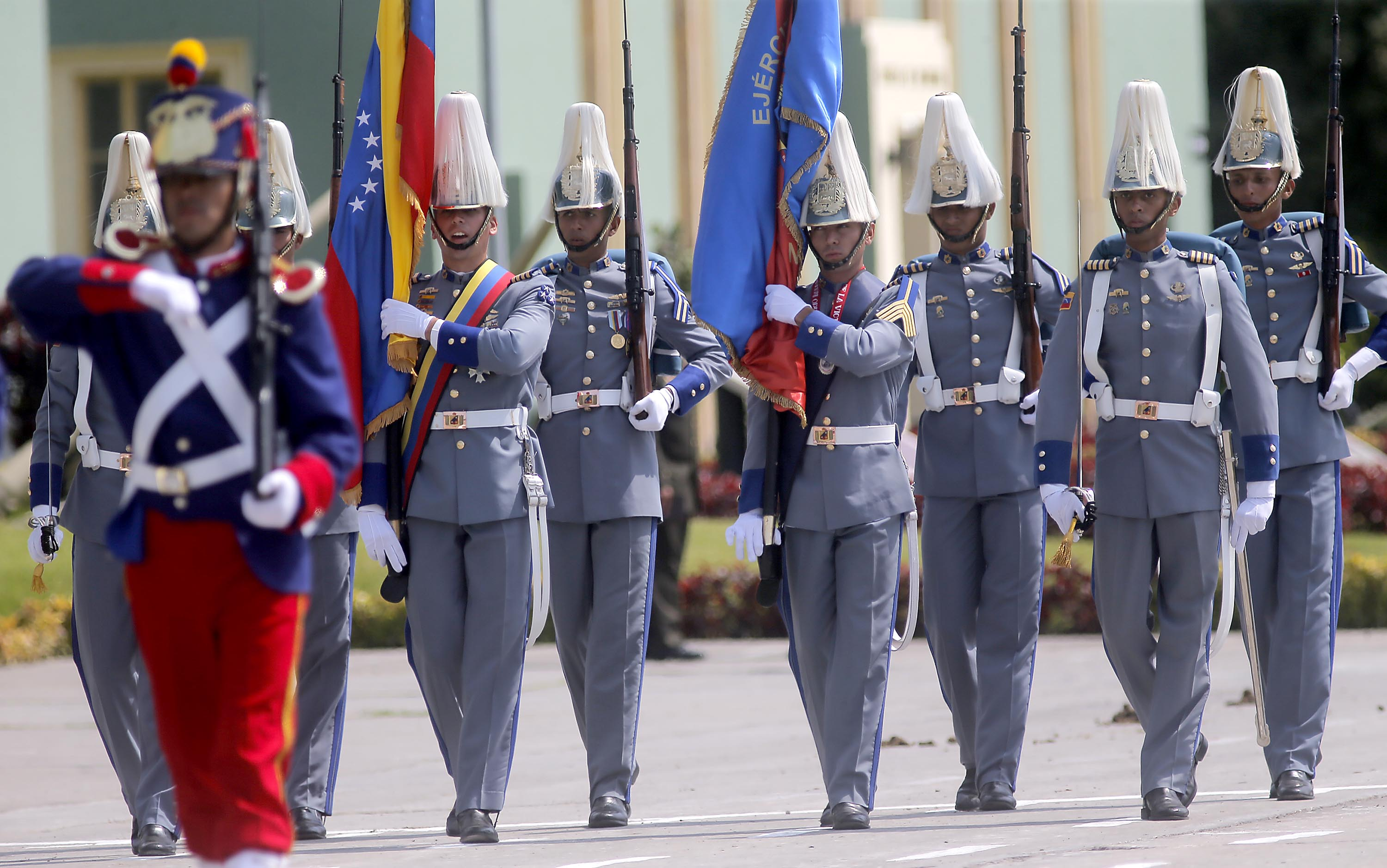 Ceremonia por el 190° Aniversario de la Batalla de Ayacucho y día del Ejército del Perú